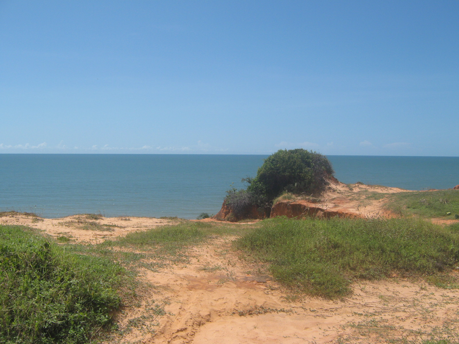 Morro Branco Beach, Fortaleza, Brazil.